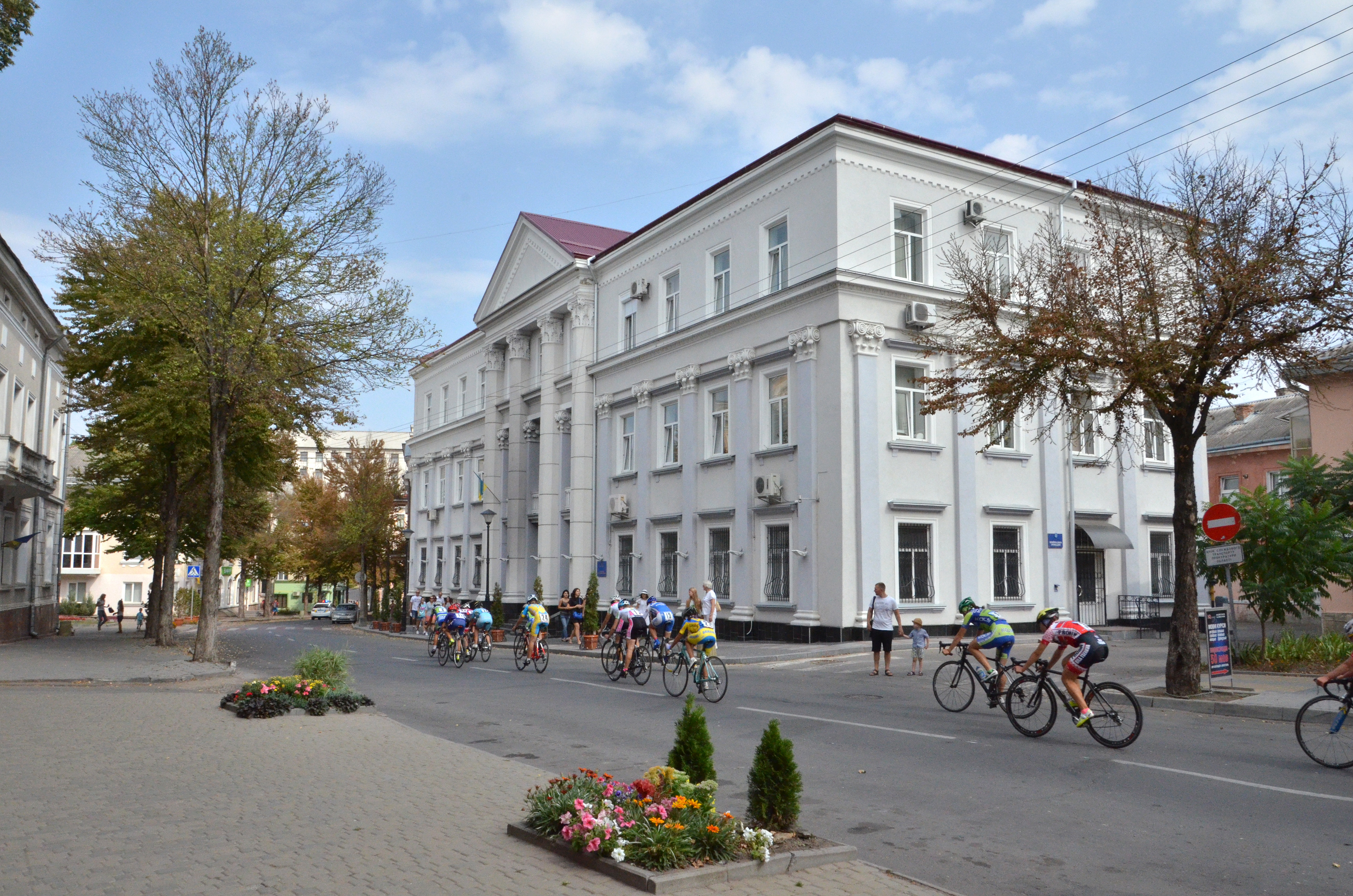 Всеукраїнські велосипедні перегони пам'яті майстра спорту Володимира Філіпенка. На тлі — пам'ятка архітектури місцевого значення «Жіночий ліцей» (нині — прокуратура Тернопільської області), м. Тернопіль, вул. Листопадова, 4.